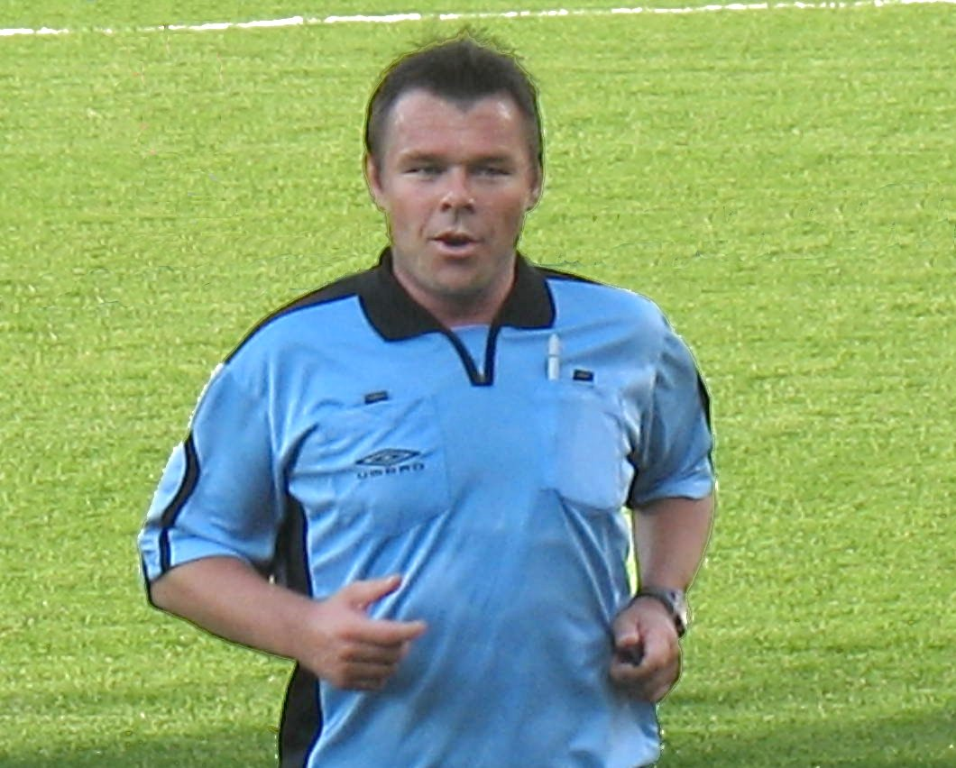 Fotballdommeren Per Ivar Staberg